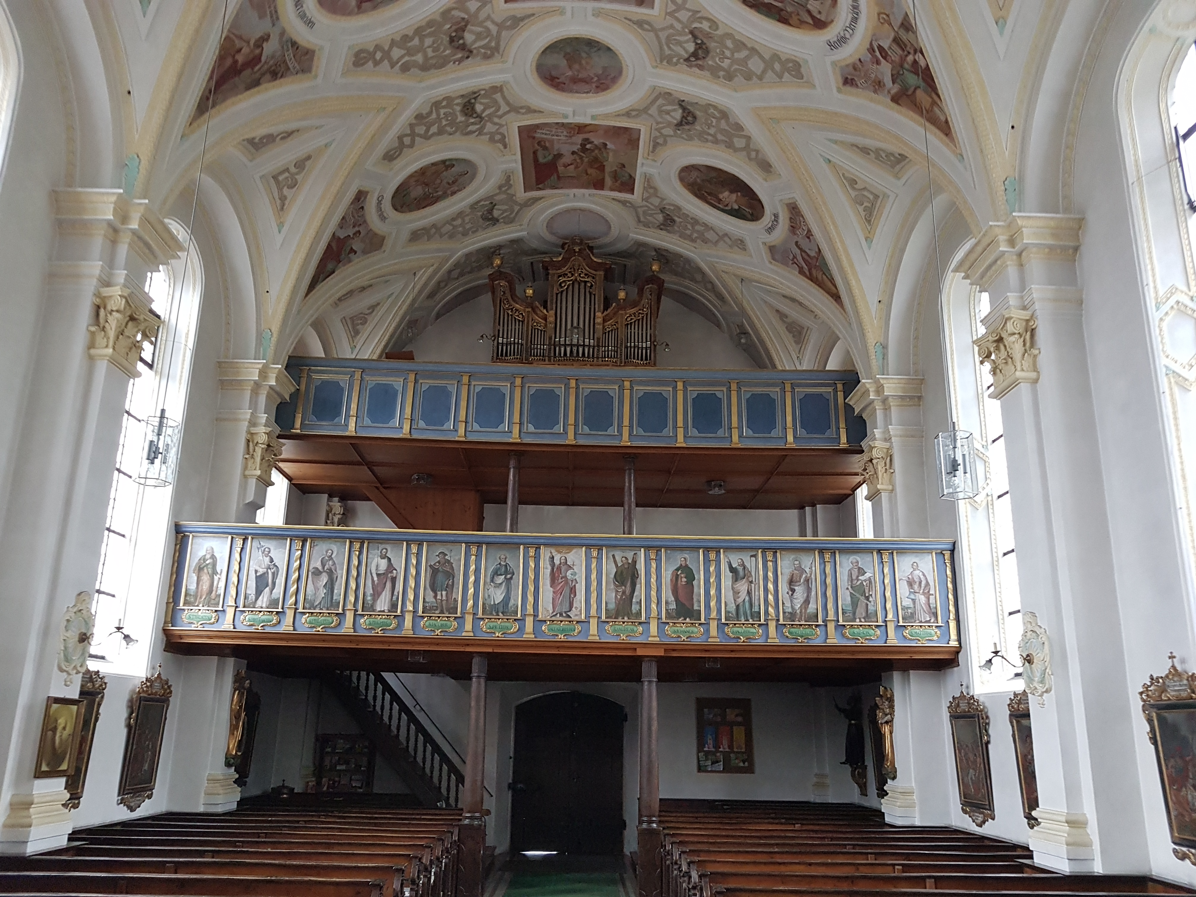 Fischbachau, Elbach, St. Andreas, Innenraum mit Blick zur Empore.